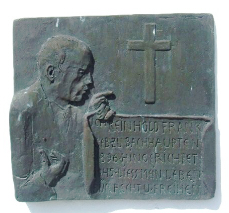 Pfarrkirche St. Michael, Bachhaupten, Gemeinde Ostrach, Landkreis Sigmaringen Gedenktafel für den aus Bachhaupten stammenden Rechtsanwalt und Wiederstandskämpfer Reinhold Frank (hingerichtet 1945)